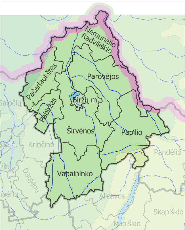 Padaryta iš lt::File:LietuvosSeniunijos.png